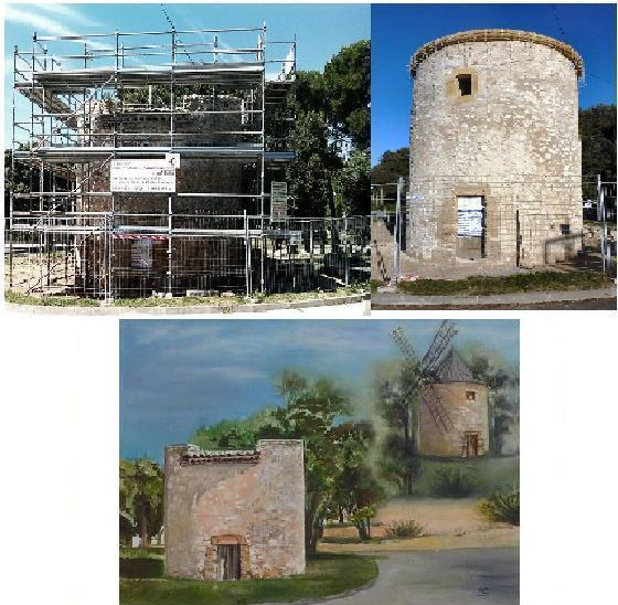 Le moulin de Bertoire, Lambesc, 2009-2012. Comparaison du tableau de S. Chaffard, membre de l'Association CPL, et des photos de la réalisation du projet de restauration.